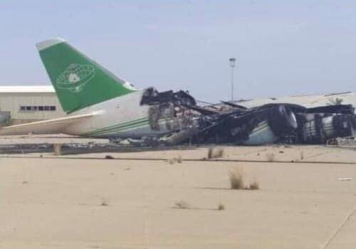 صورة طائرة انطونوف ليبية تم تدميرها اثناء الاشتباكات